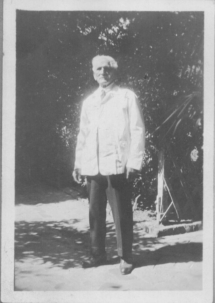 fotografía del Maquinista de Ferrocarril Manuel Acuña a los 80 años.